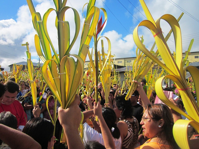 Domingo de Ramos celebrado por Iquitos.